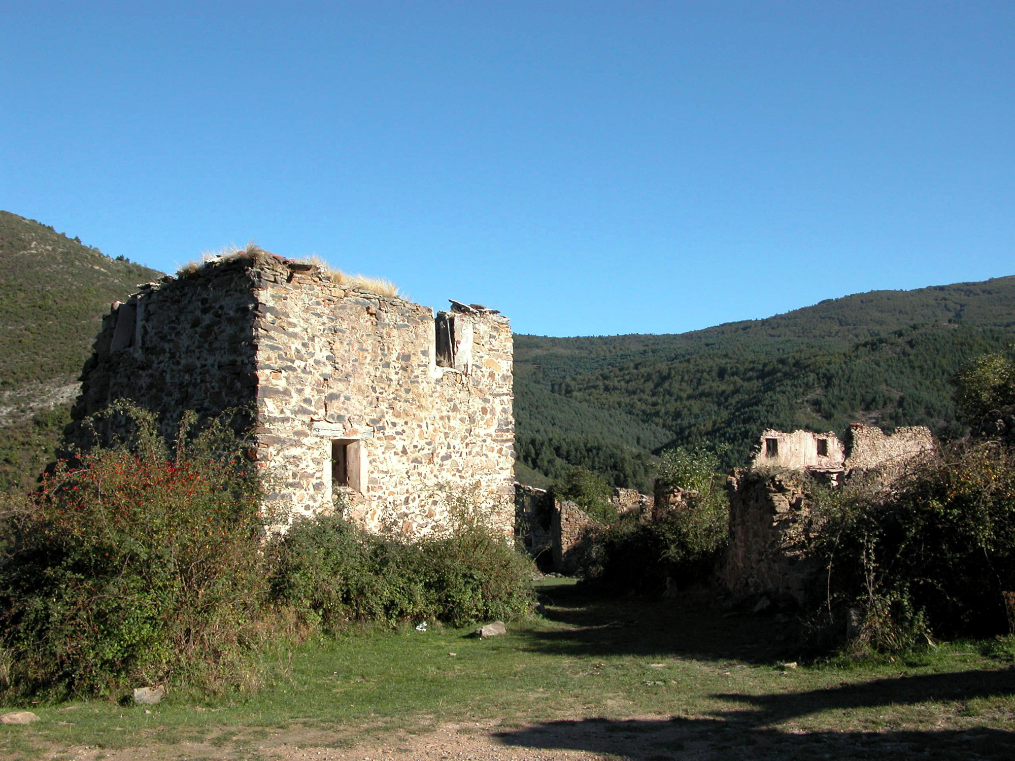 Avellaneda, despoblado de San Román de Cameros (La Rioja, España)